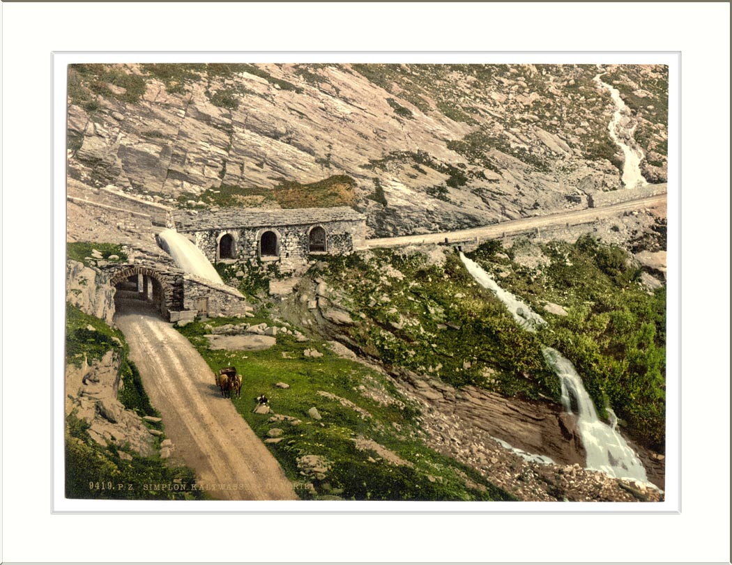 Simplon Pass Kaltwasser Gallerie Valais Alps of Switzerland